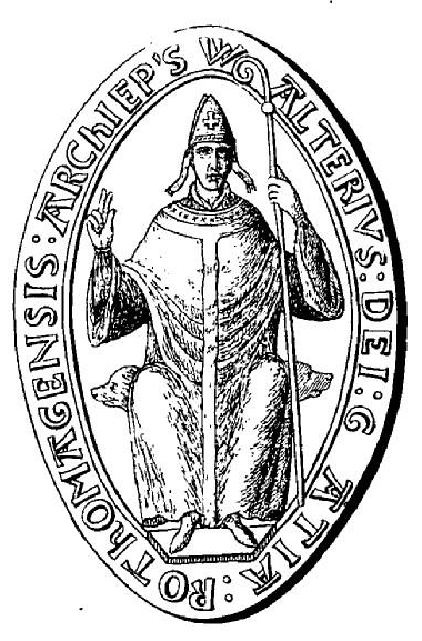 Sceau de Gautier de Coutances.